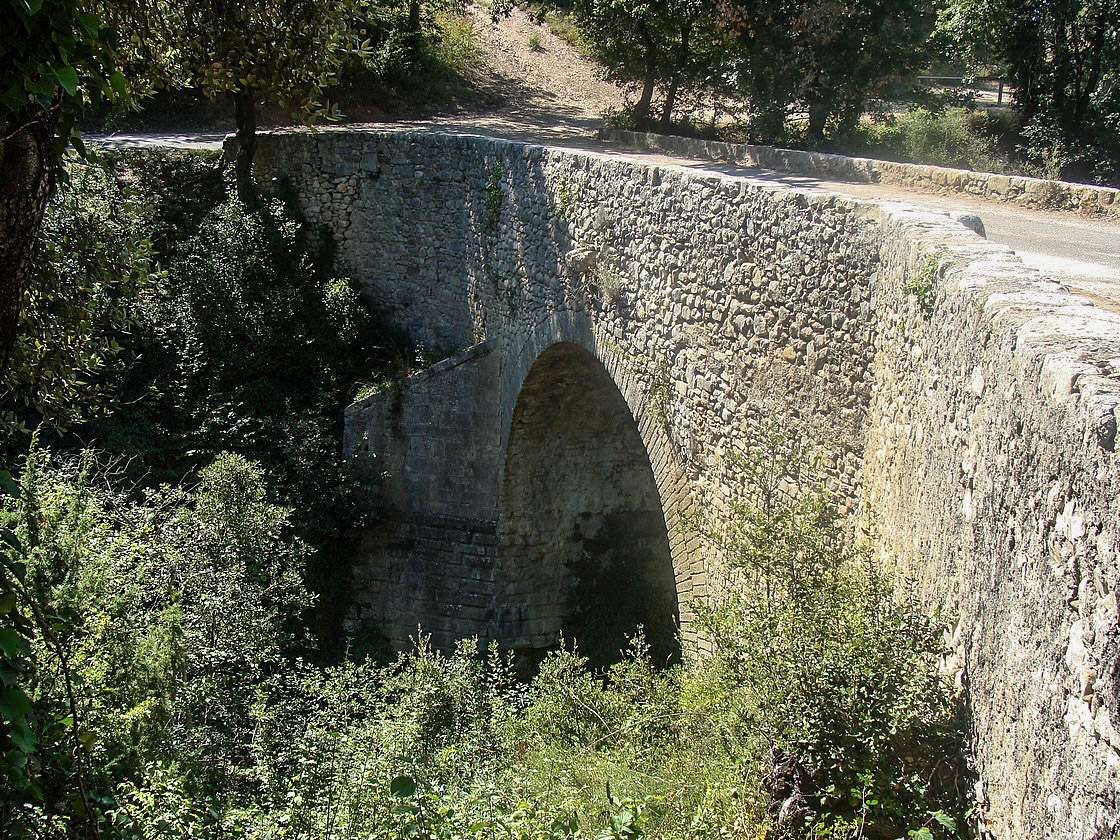 Le Pont romain du Buès, entre Lurs et Ganagobie (Alpes-de-Haute-Provence) ; vue d'ensemble depuis la rive gauche.